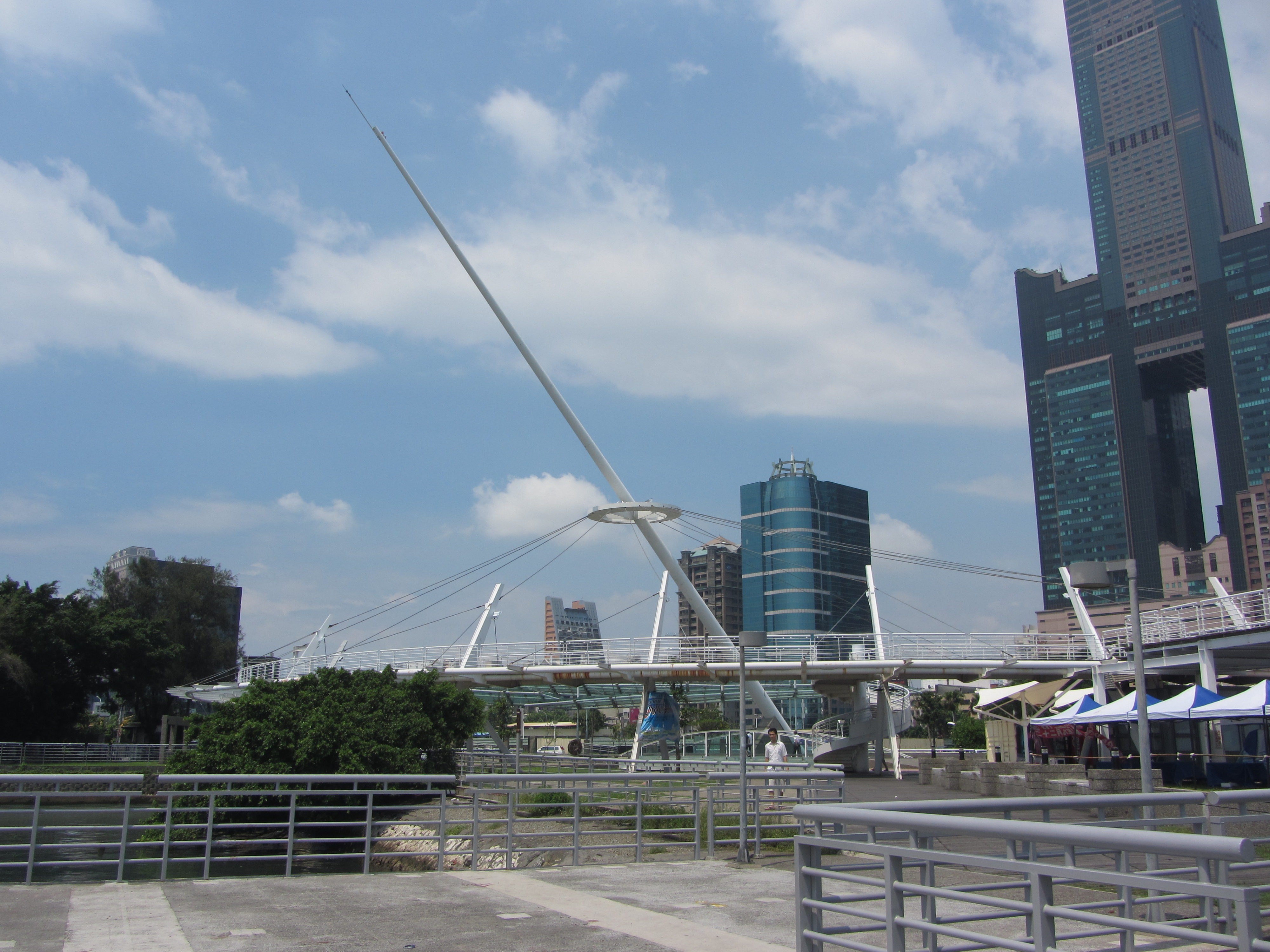 高雄市新光碼頭日晷裝置藝術